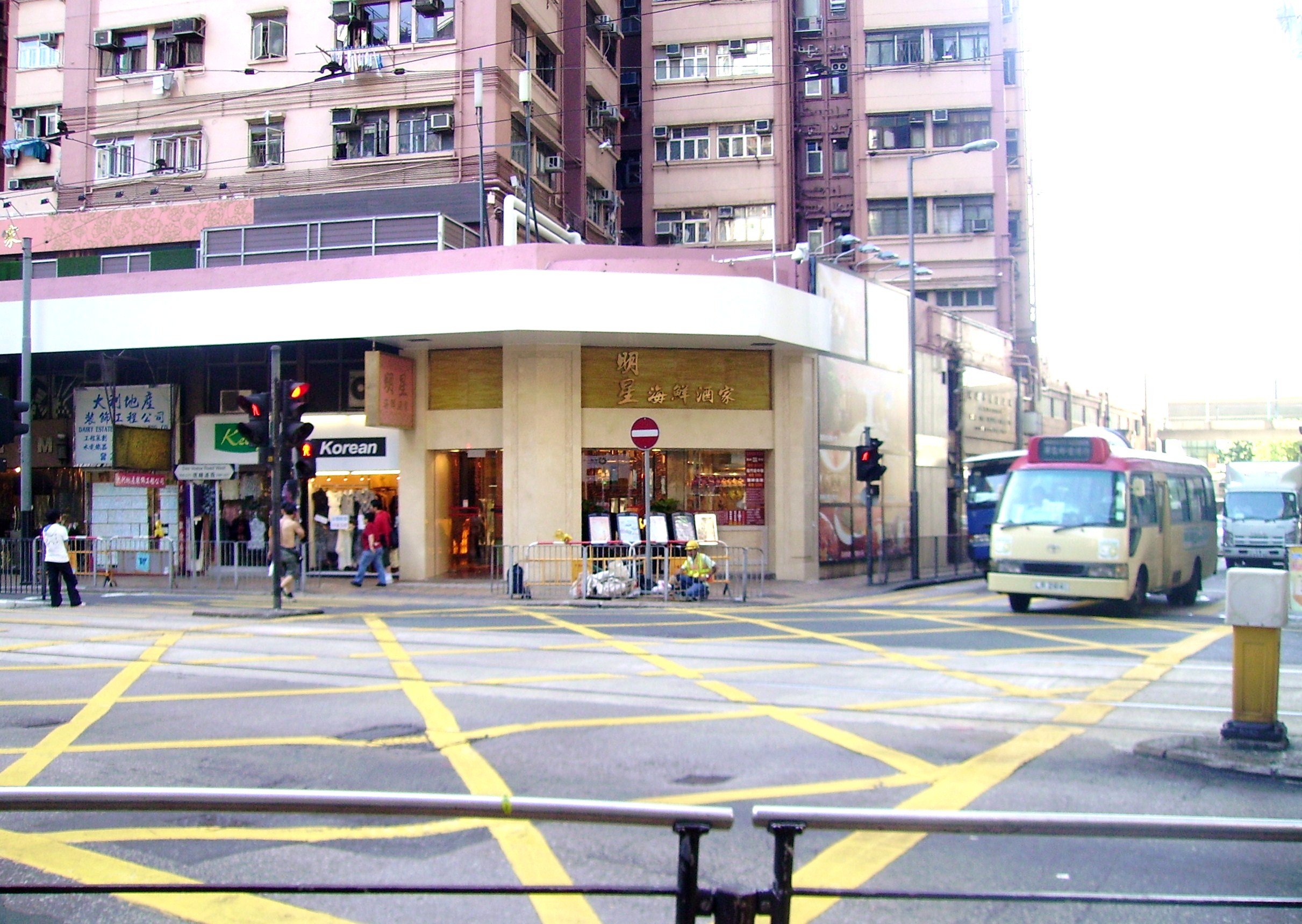 明星海鮮酒家(西環店)門面